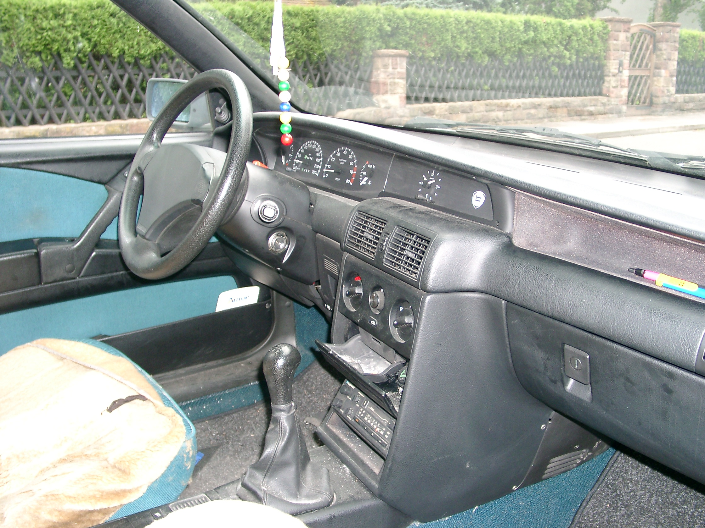 Lancia Delta (2nd generation), 1994, Armaturen